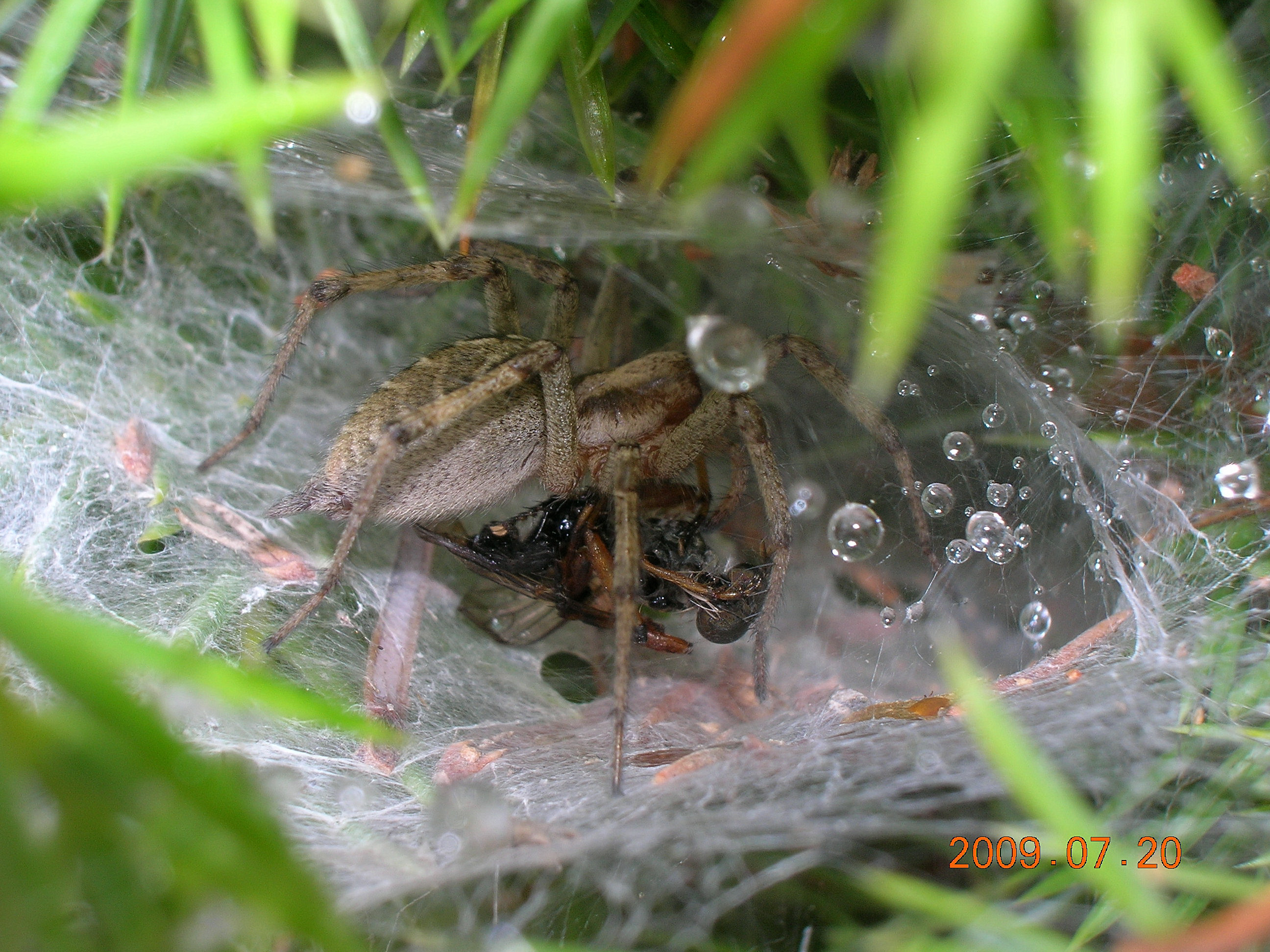 Lejkowiec labiryntowy (Agelena labyrinthica), Poland